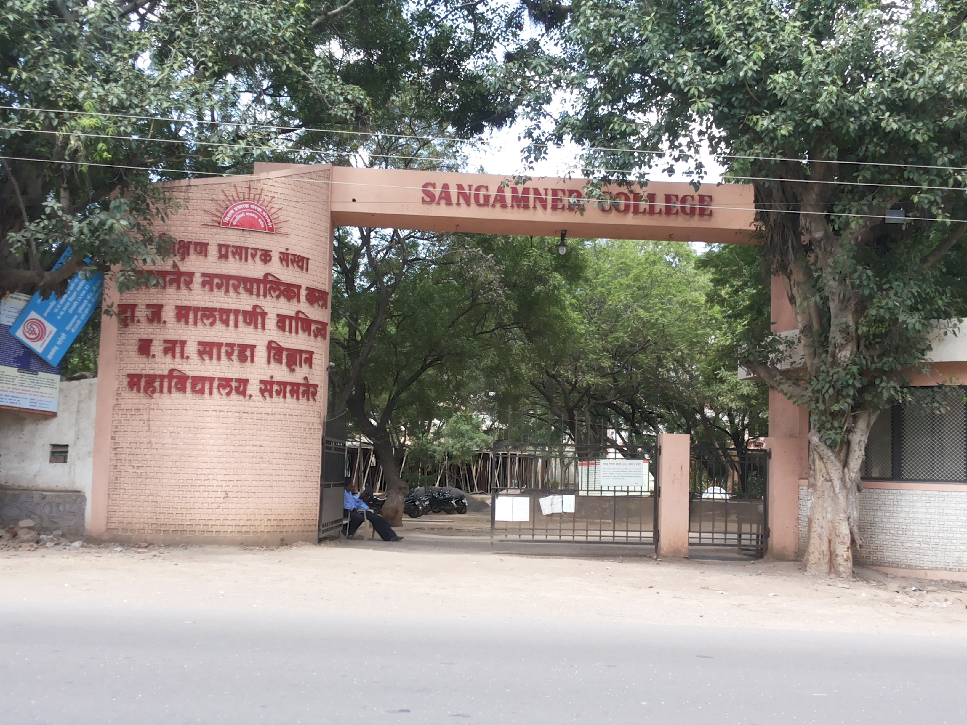 महाविद्यालयाचे मुख्य प्रवेशद्वार